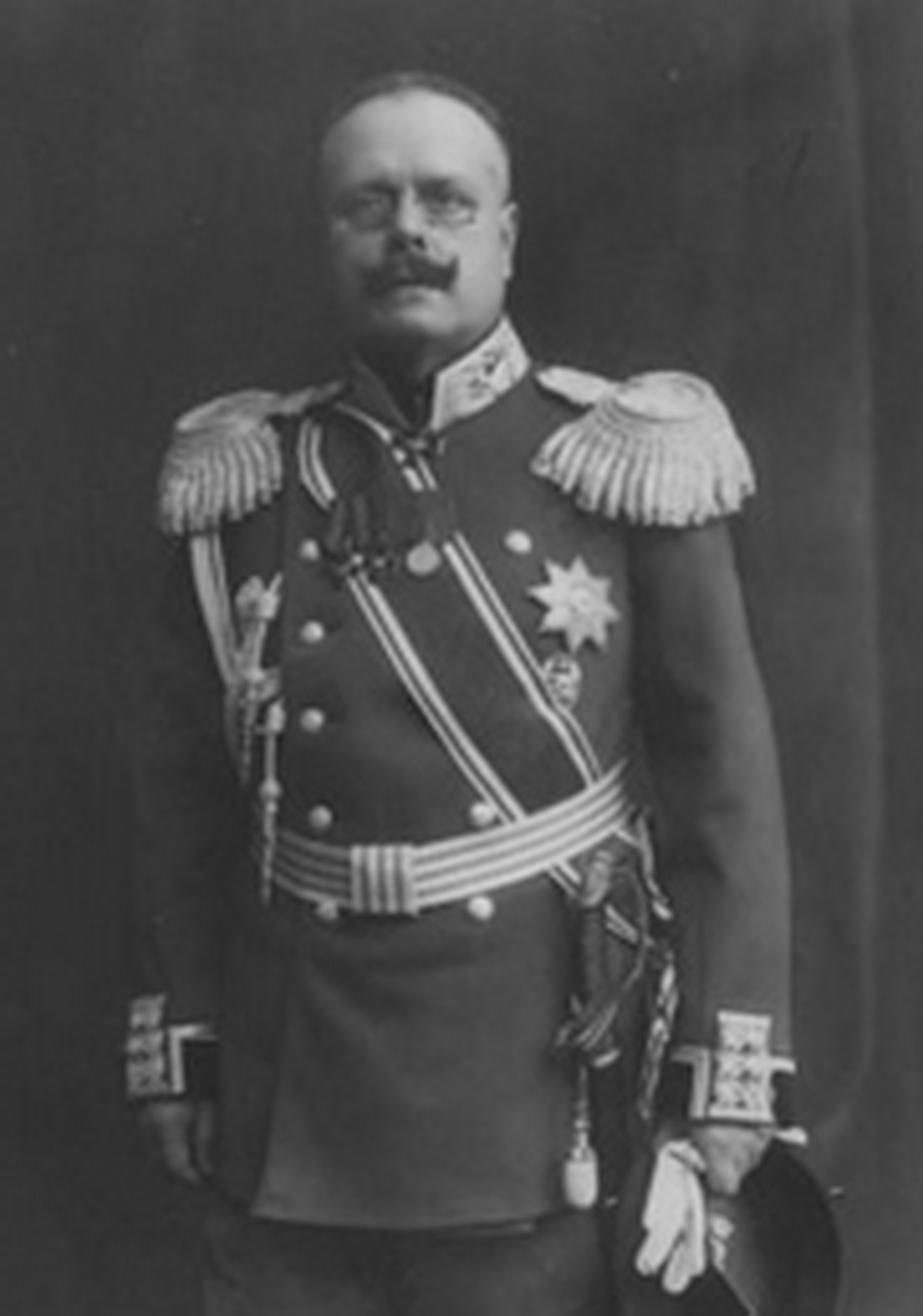 Зейн Франц Александрович